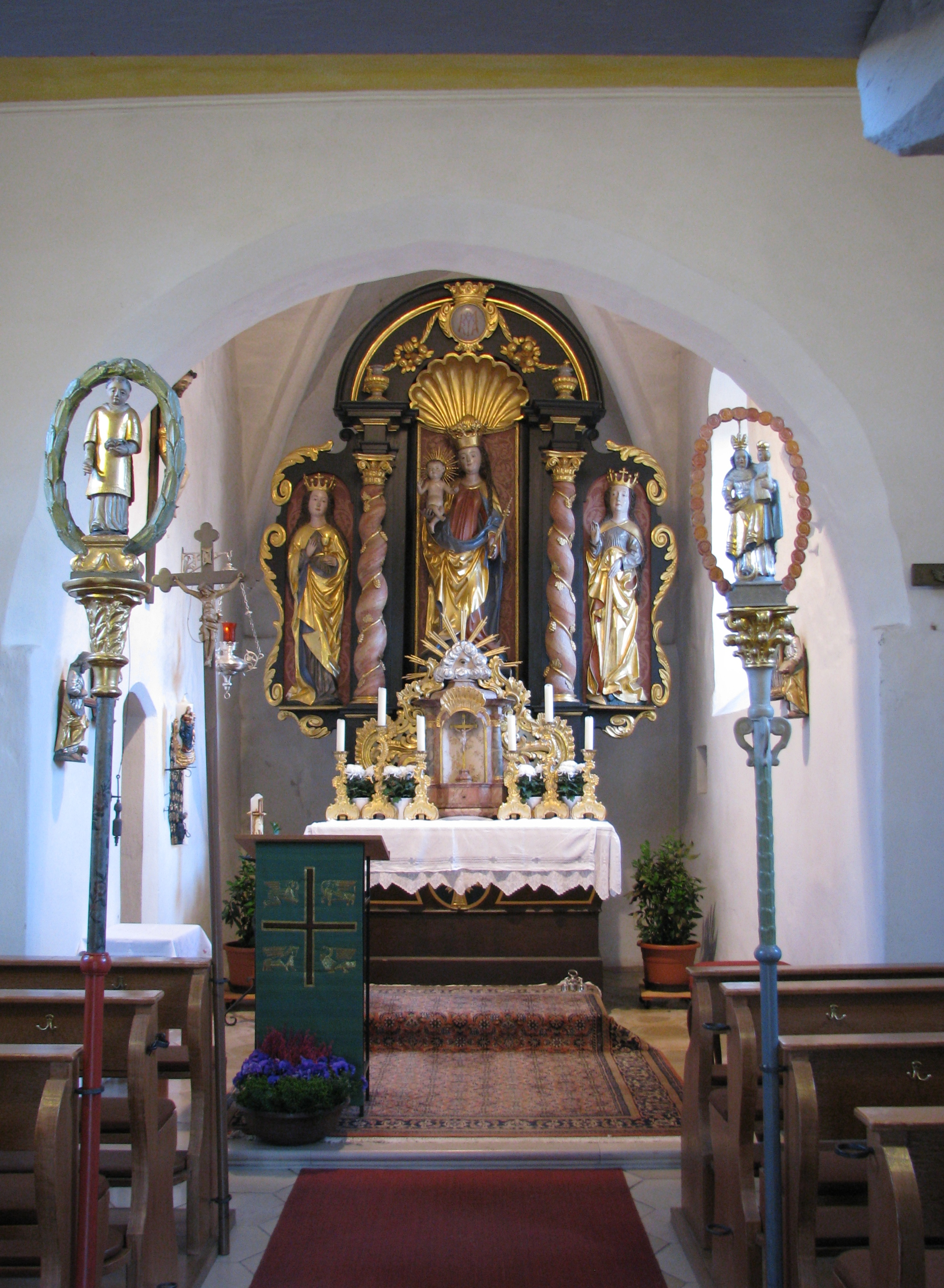 Hofstetten, Ortsteil von Hilpoltstein im mittelfränkischen Landkreis Roth, Katholische Filialkirche Mariä Verkündigung